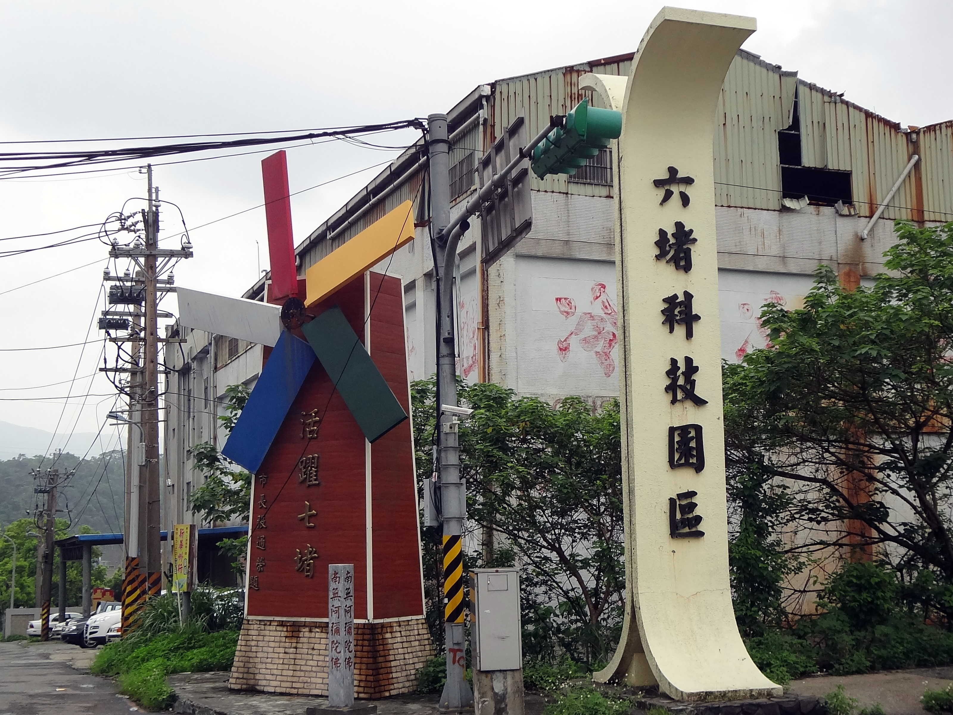 臺灣基隆市七堵區工建路與明德二路口，六堵科技園區入口。